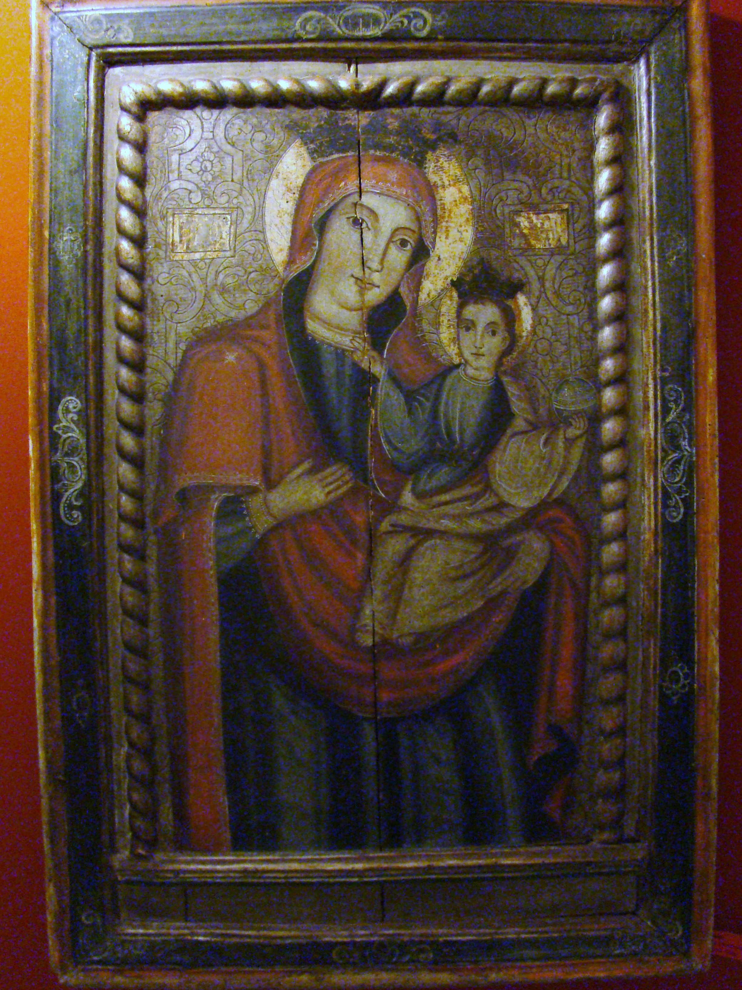 Icoană care a aparținut fostei biserici de lemn din Rus, județul Sălaj